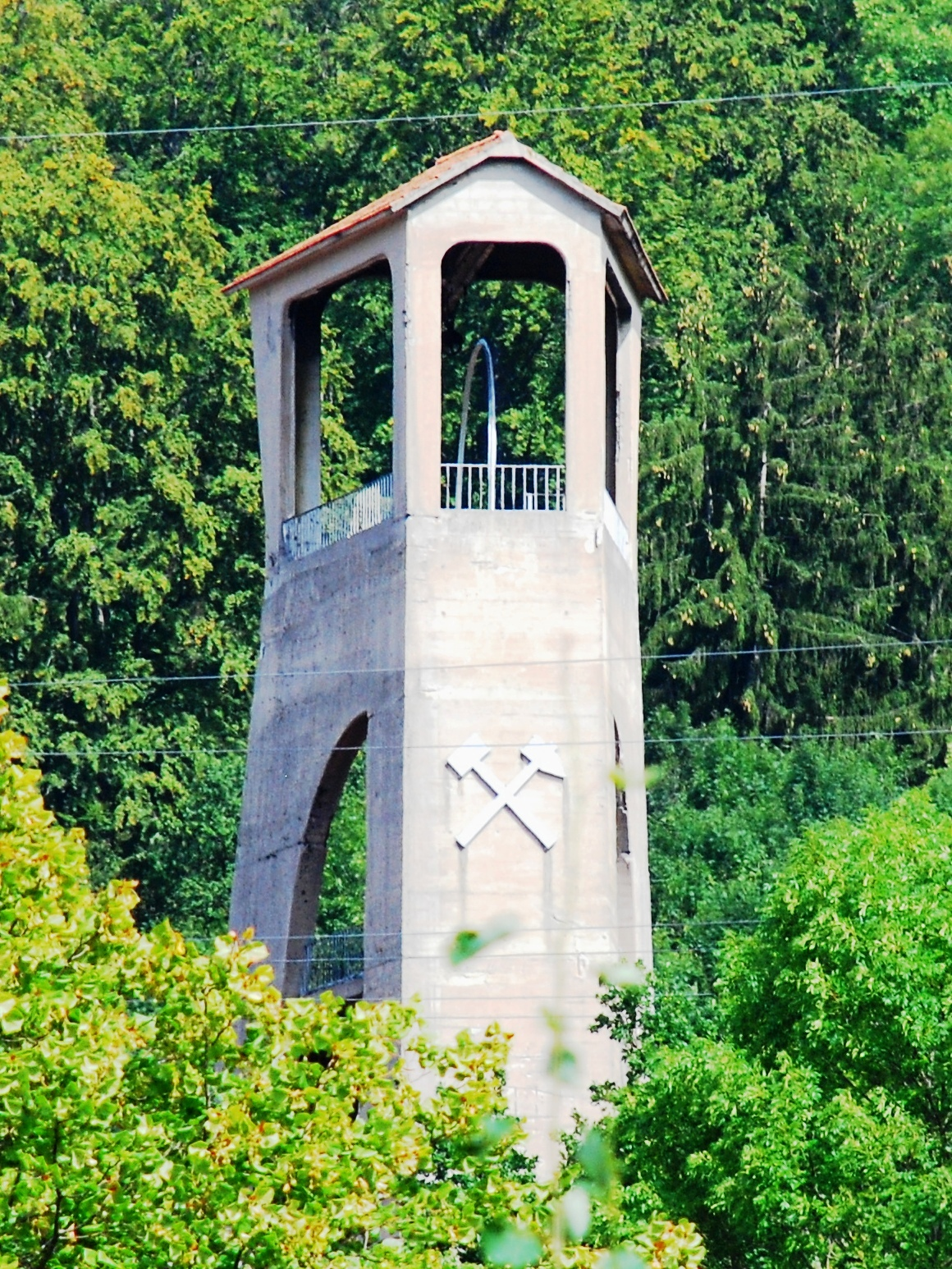 Förderturm des ehemaligen Bergwerks Hausham in Hausham, Landkreis Miesbach, Regierungsbezirk Oberbayern, Bayern. Als Baudenkmal in der Bayerischen Denkmalliste aufgeführt. Laut Denkmalliste nach Plänen von Fritz Schupp und Martin Kremmer erbaut in den Jahren 1934/1935.